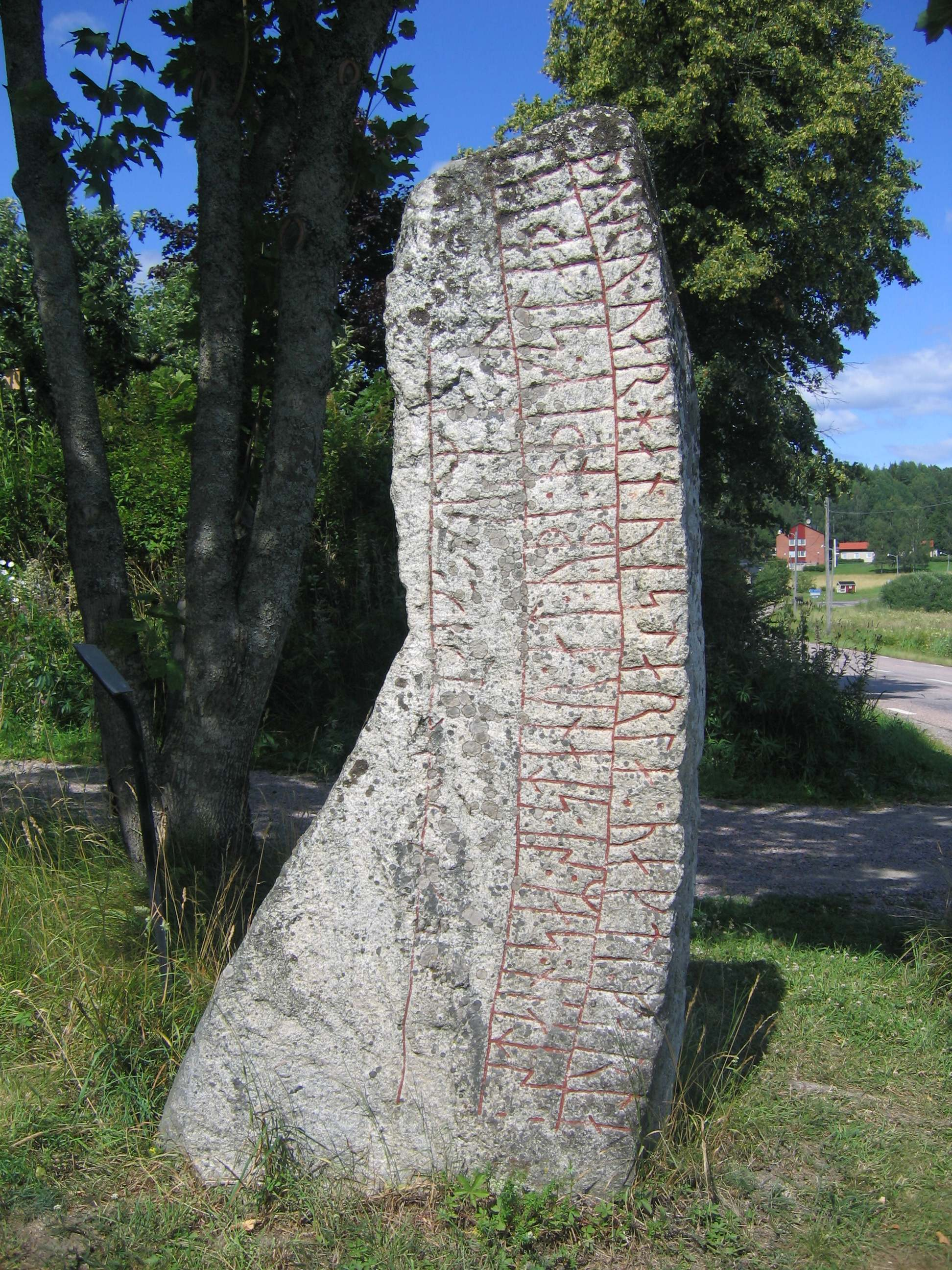 Runestone Sö 137 side B